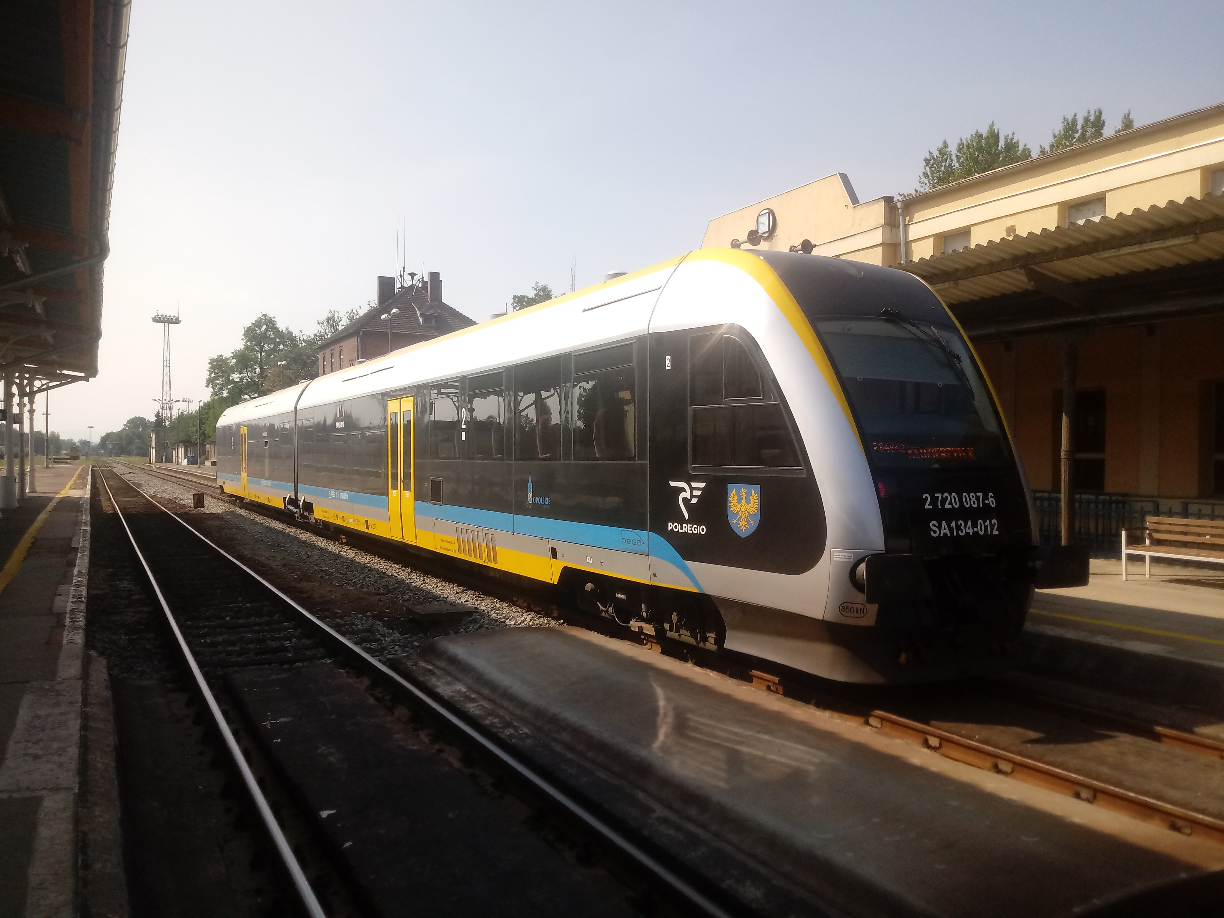 SA134-012 w nowych barwach stoi na stacji w Nysie.